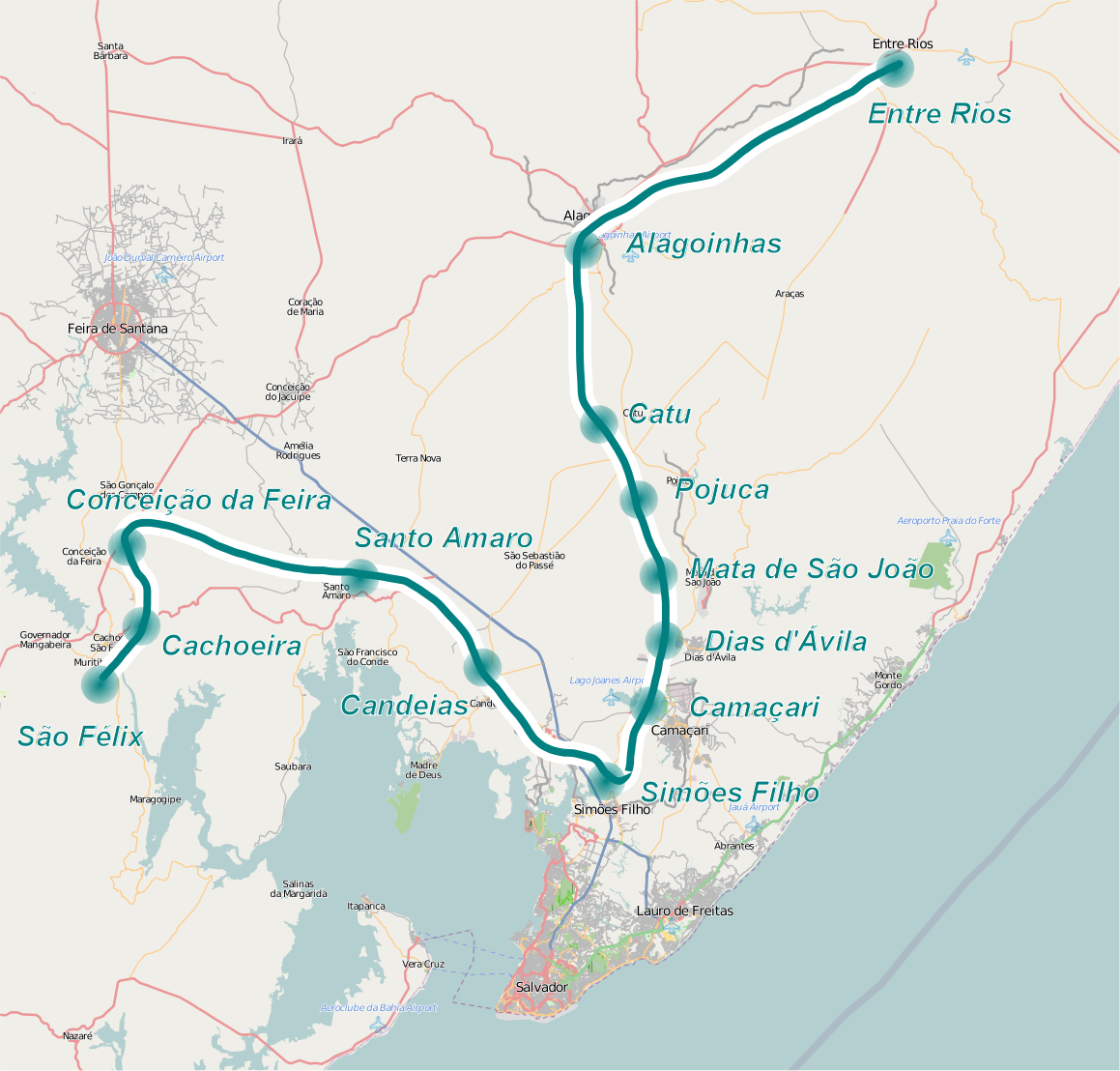 Cidades do percurso do Transbaião, na Bahia, Brasil. Traçado não exato da ferrovia.